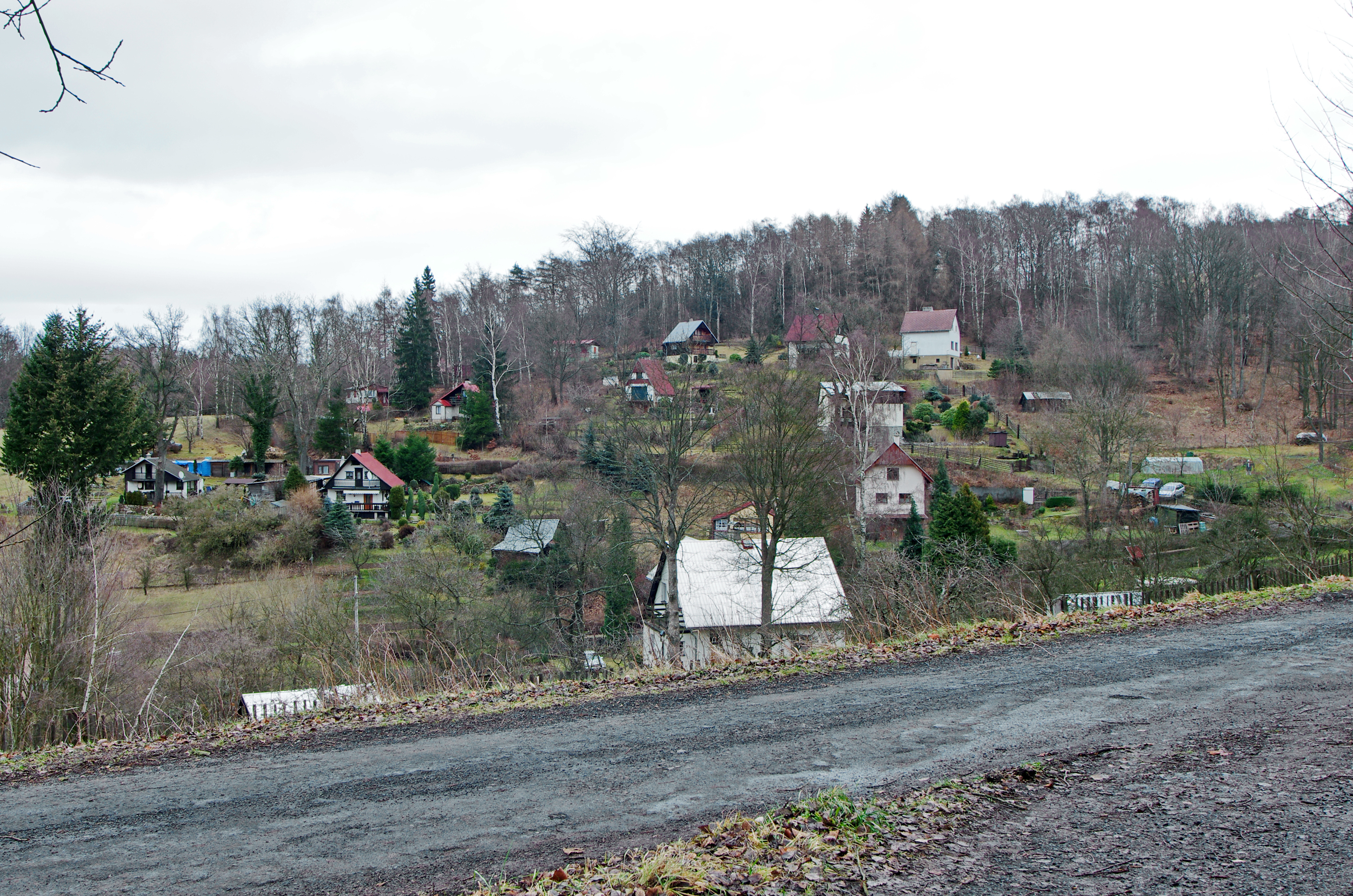 Kamenice, část města Březová, Slavkovský les, okres Sokolov